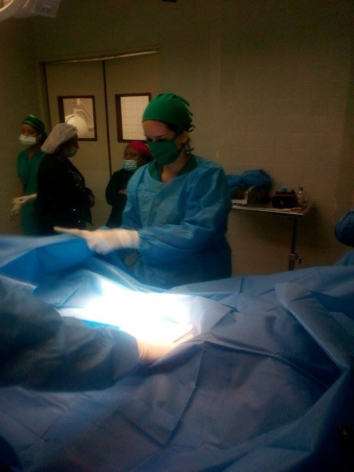 Vestimenta Quirúrgica en Quirófano.